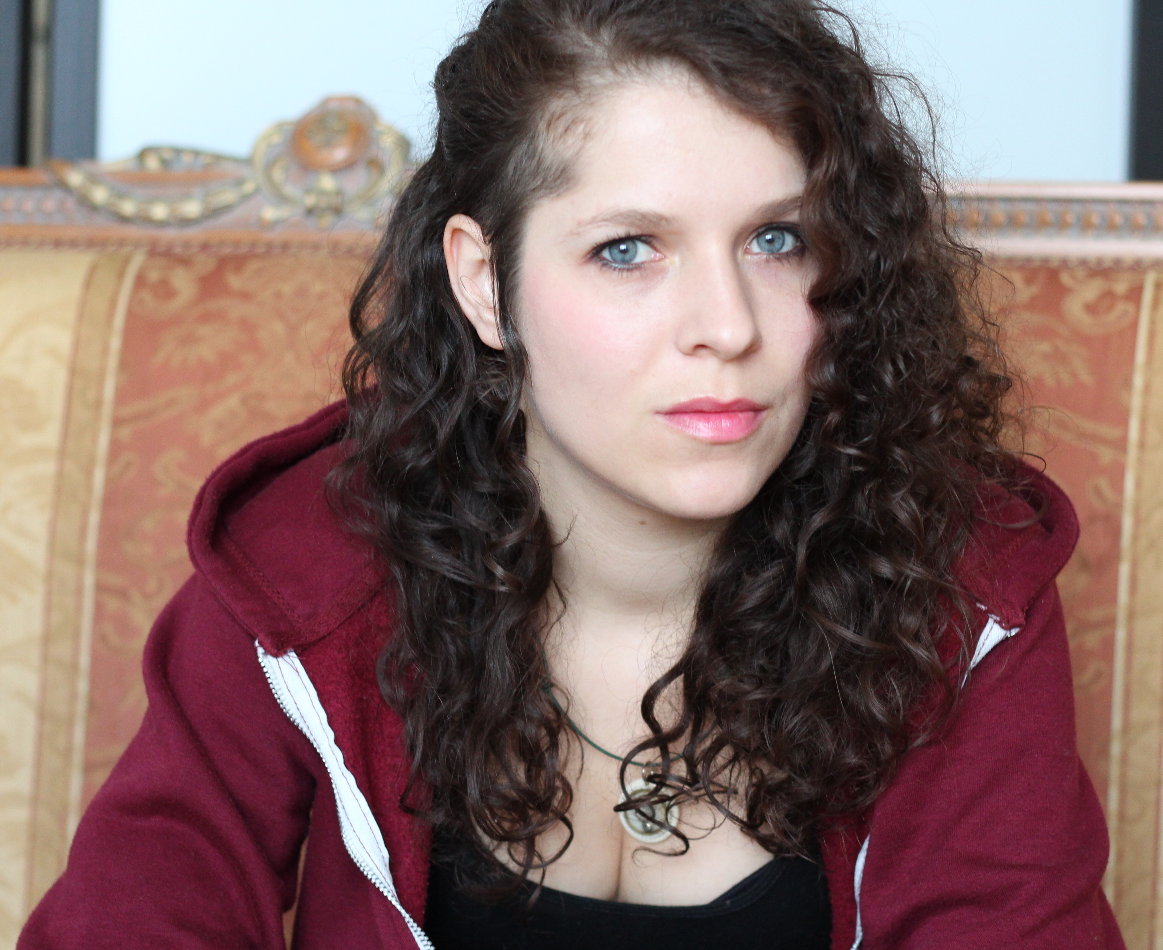 Anne Helm (2015)